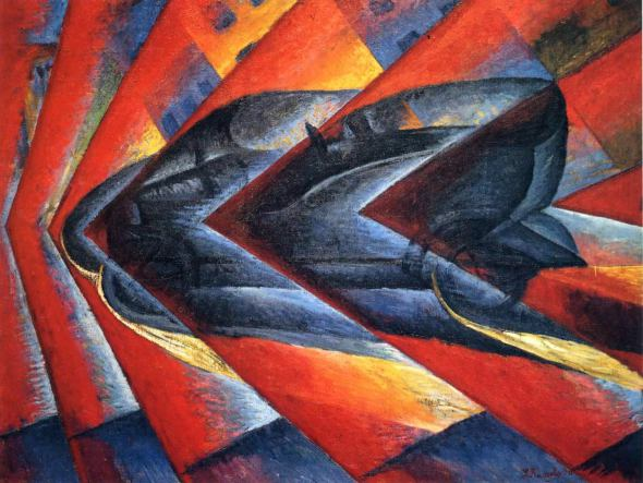 картины художника Луиджи Руссоло